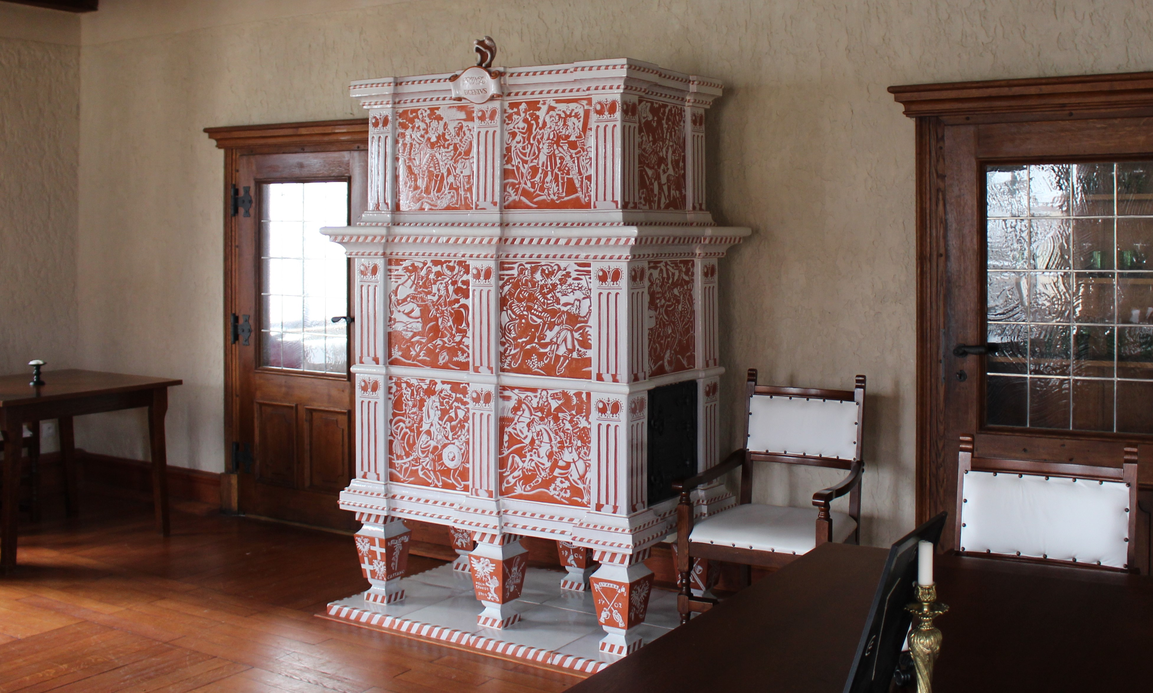 Kachelofen aus der Festung Spielberg in Brünn hergestellt durch die Keramischen Werkstätte Angermayer, bemlat durch Karl M. Adlmannseder. Darstellungen aus dem Leben von Prinz Eugen.